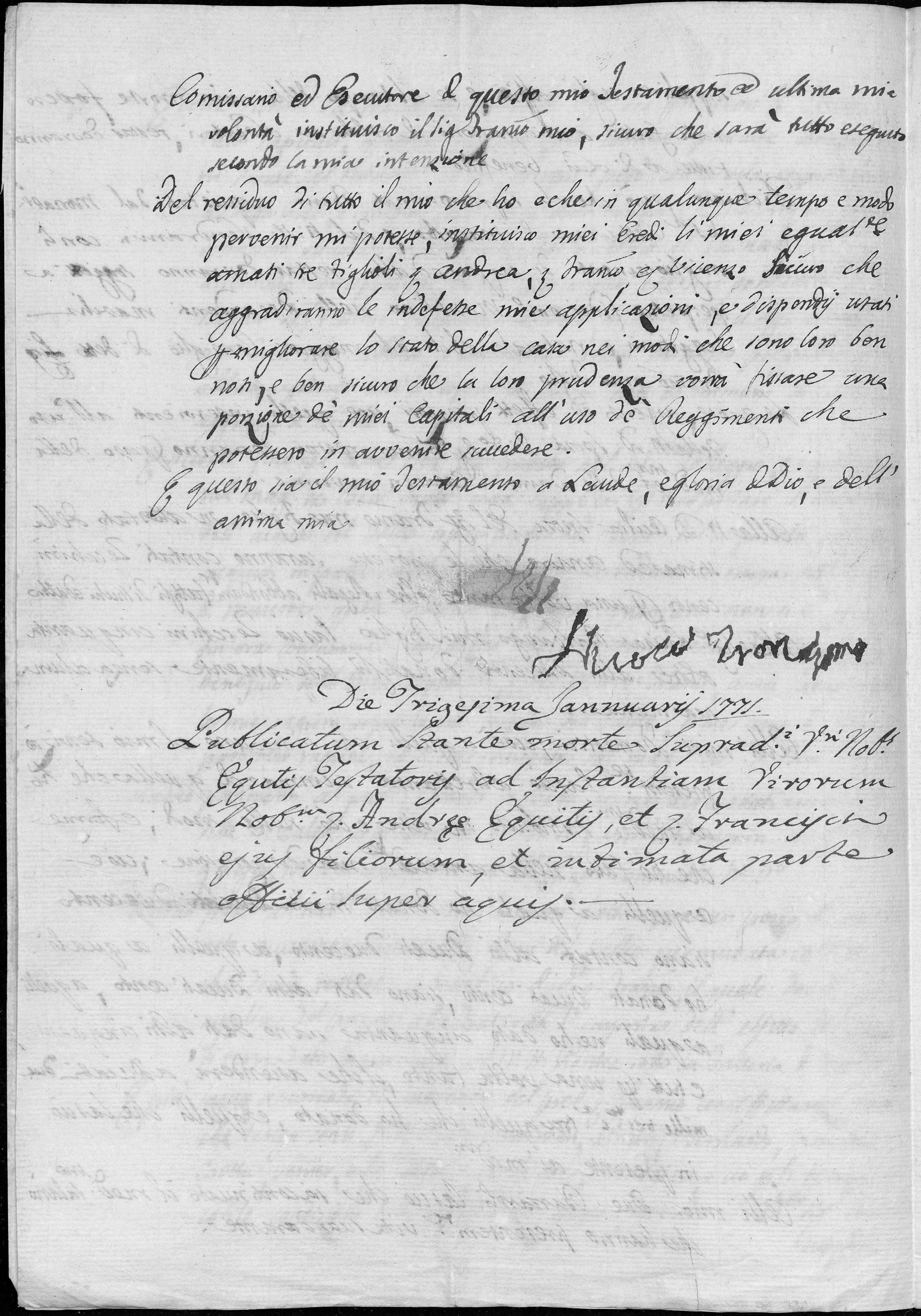 Quarta pagina del testamento di Nicolò Tron, in copia in formato PDF presso la Biblioteca Civica di Schio, originale presso Museo Correr di Venezia.